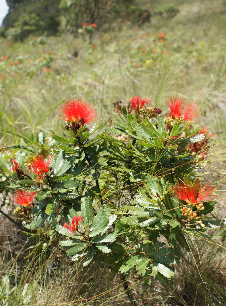 Calliandra mucugeana - FABACEAE Chapada Diamantina - Parque Natural Municipal Morro do Pai Inácio - Palmeiras - Bahia - Brasil.